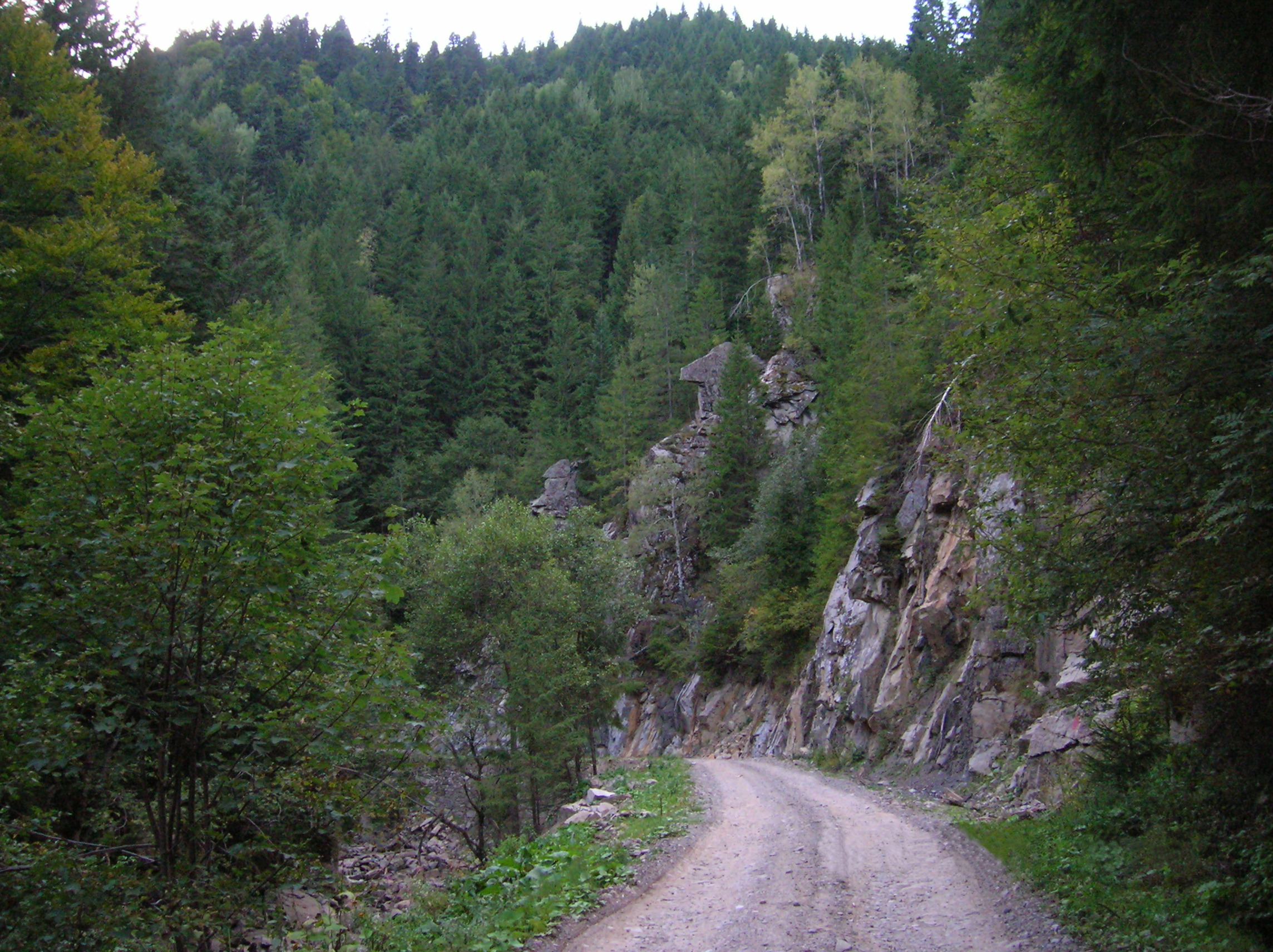 Munţii Tarcăului (Carpaţii Orientali, România)-Prin defileul Bplovănişului